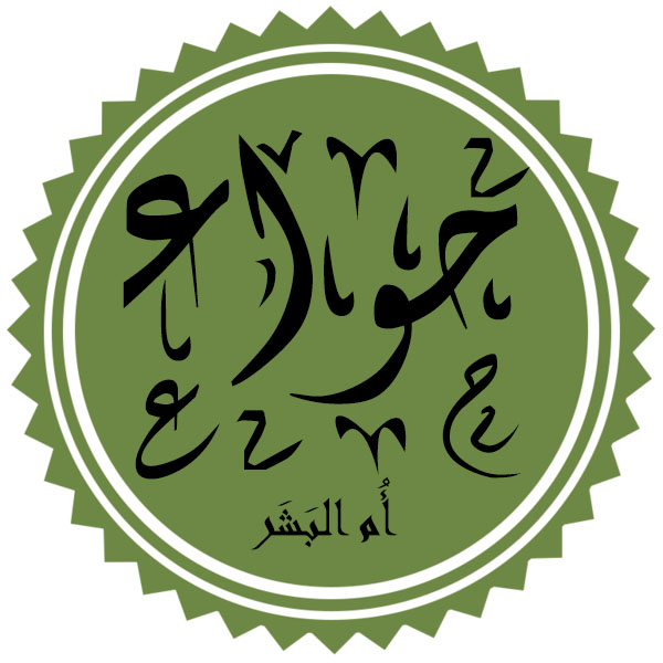 تخطيط لاسم السيدة حواء